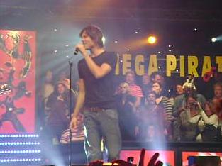 Simon Keizer tijdens Mega Piraten Festijn in Marum (2008).